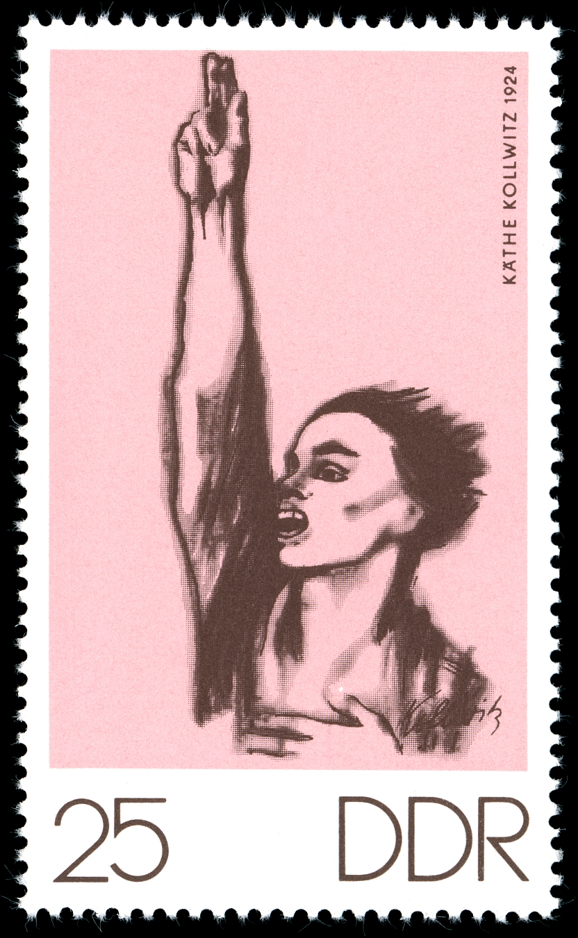 Information: Kunstwoche; Gedenken an Otto Nagel, Käthe Kollwitz und Ernst Barlach: Käthe Kollwitz: Nie wieder Krieg ( Plakat für den Mitteldeutschen Jugendtag 1924 in Leipzig) Ausgabepreis: 25 Pfennig First Day of Issue / Erstausgabetag: 22. September 1970 Auflage: 1.700.000 Entwurf: Klaus Wittkugel und Naumann Druckverfahren: Offsetdruck Michel-Katalog-Nr: Ländercode-MiNr: 1609